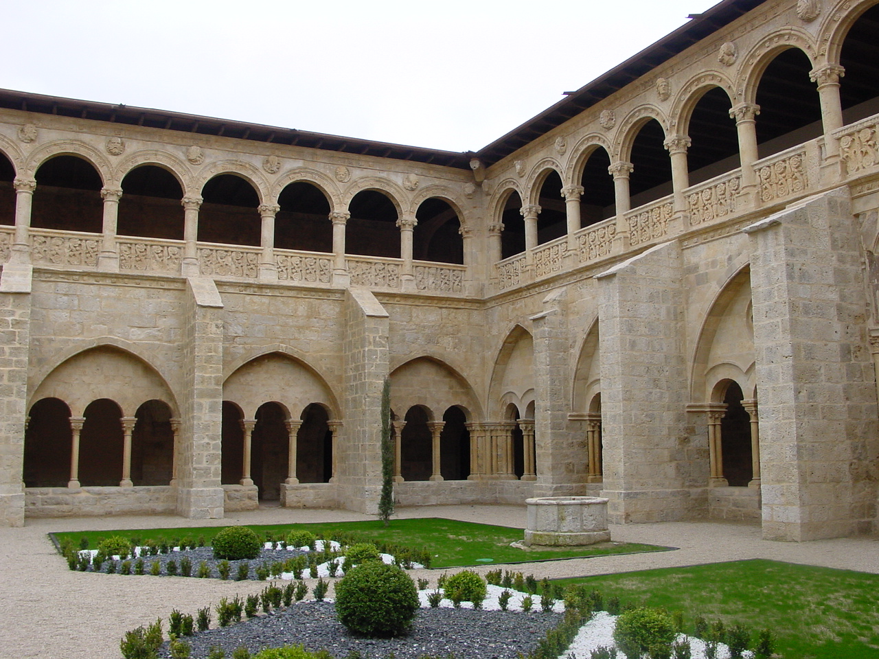 Monasterio cisterciense de Santa María de Valbuena en el término de Valbuena de Duero (Valladolid). Claustro.